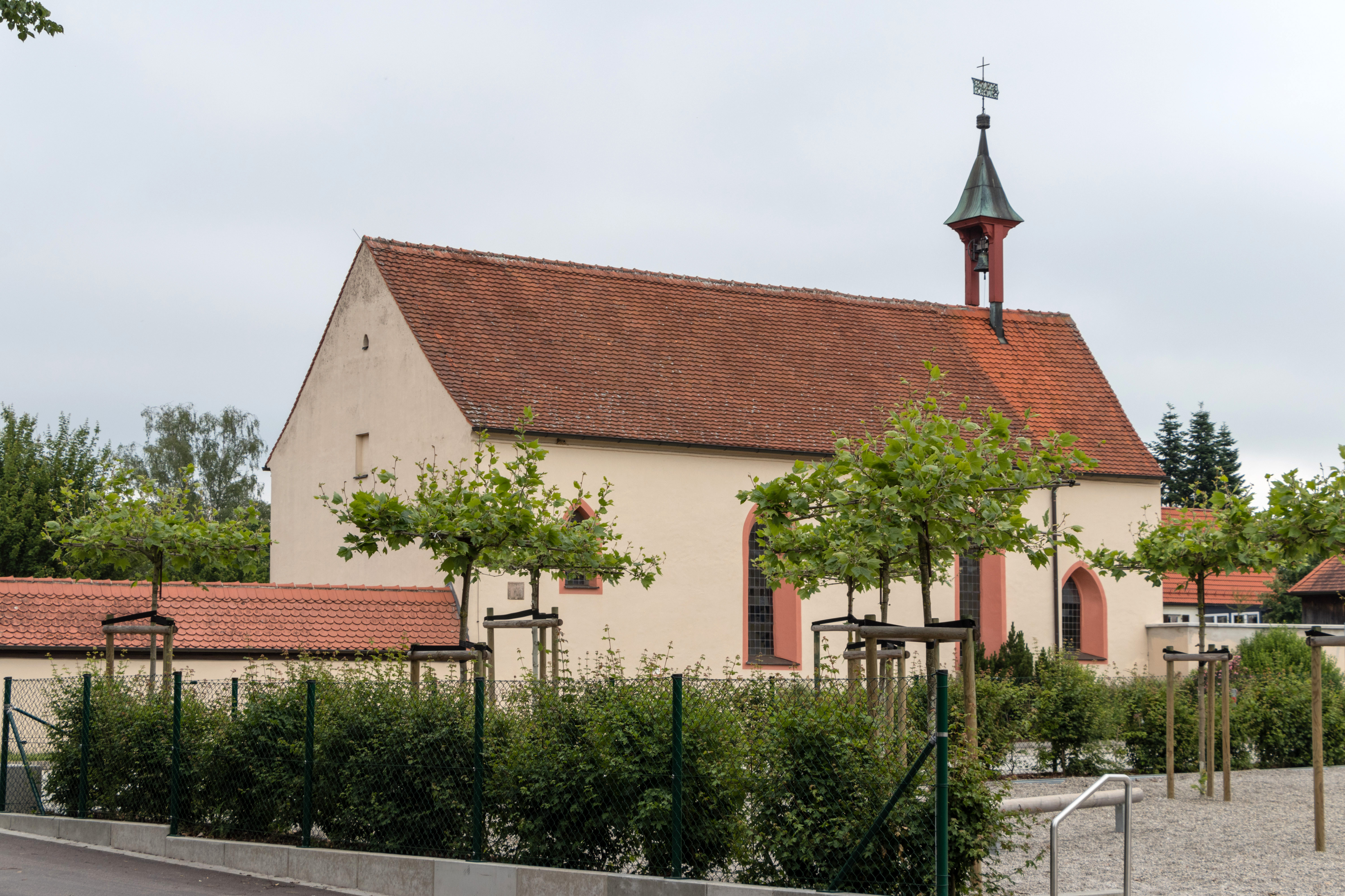 Kleine Landesgartenschau, 2019, Wassertrüdingen, Friedhof, Kapelle